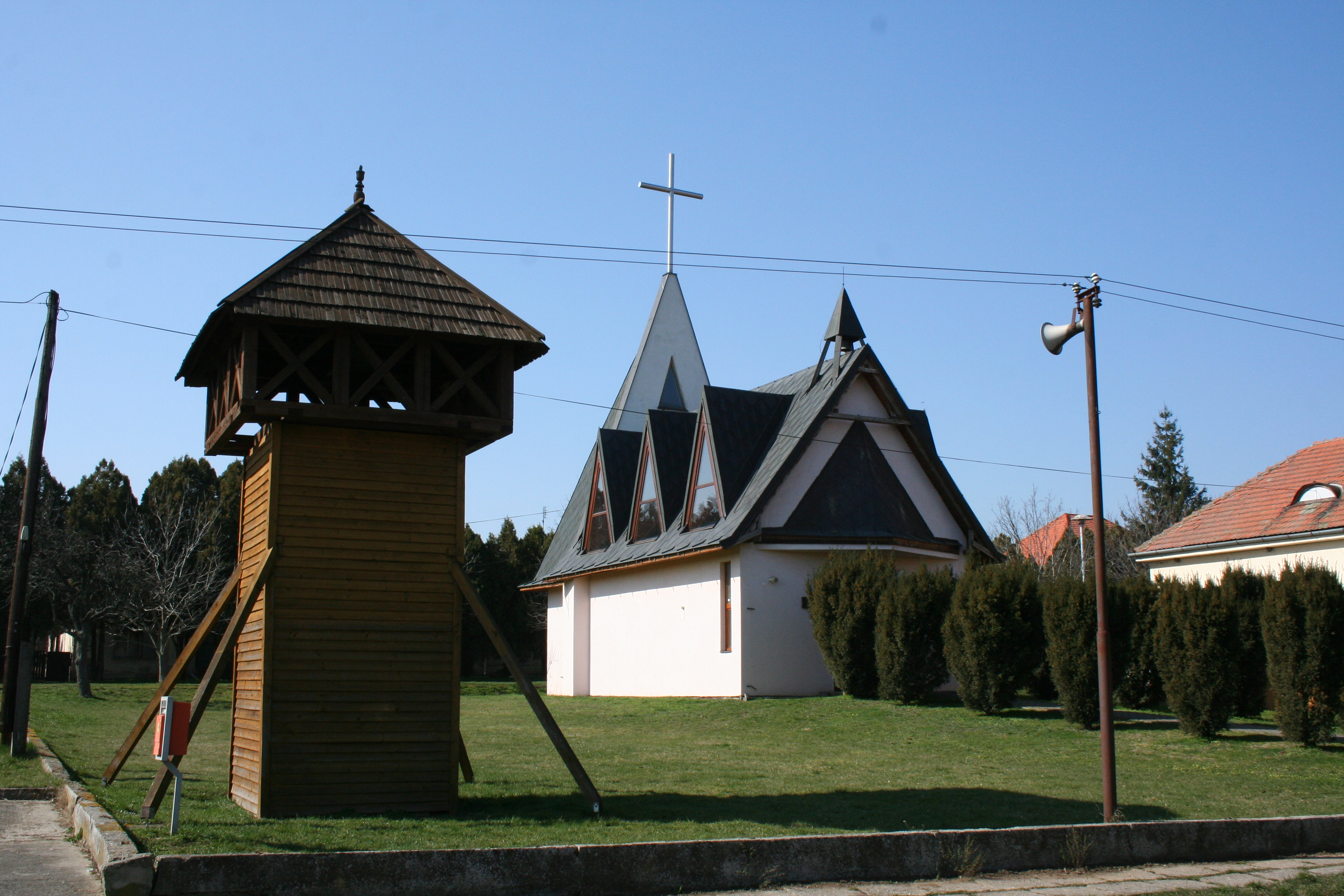 Újpuszta